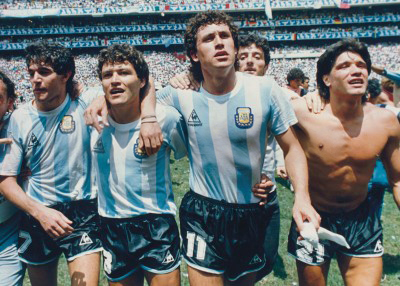 Jorge Valdano dando la vuelta olímpica en México 1986.